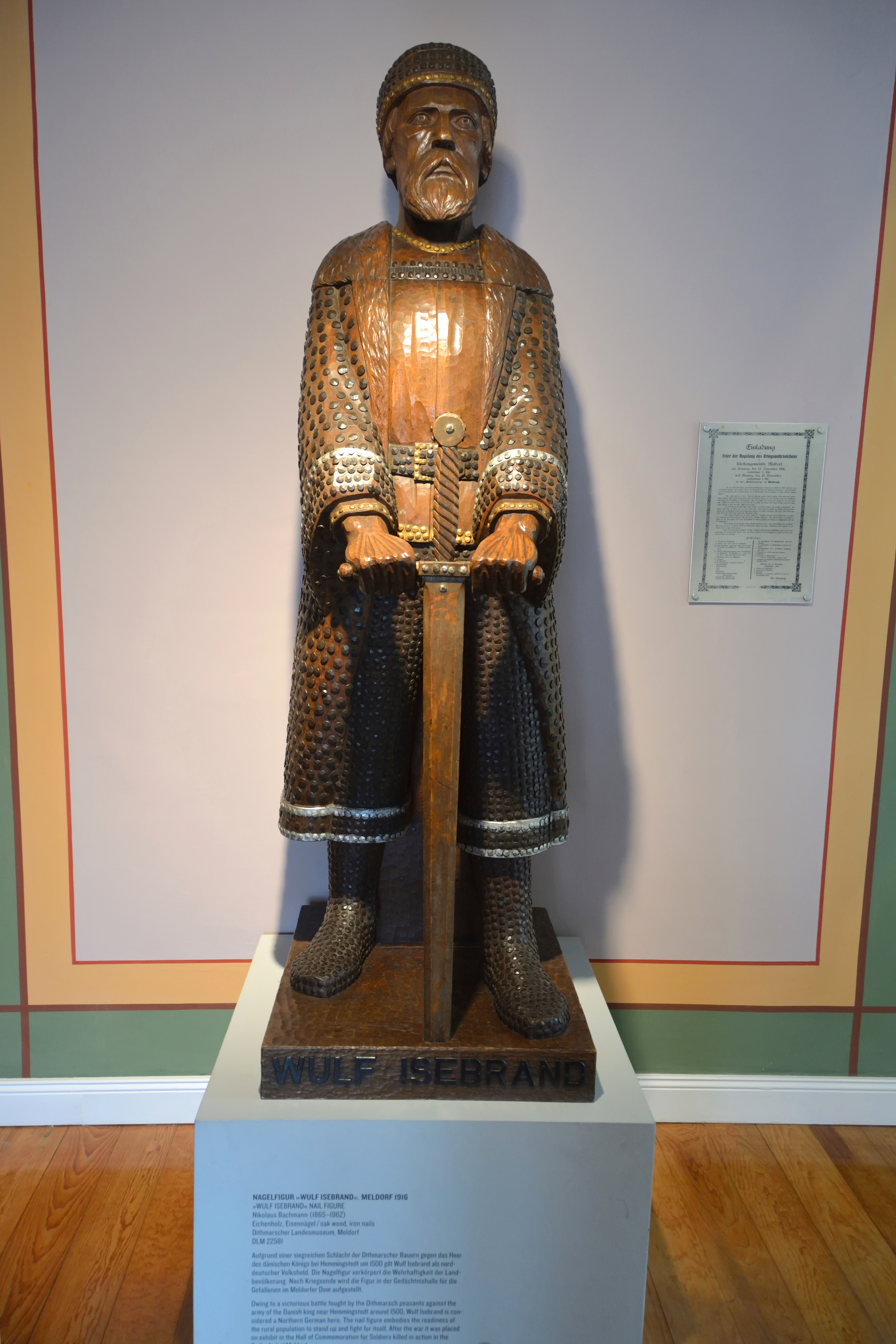 Impressionen aus dem Dithmarscher Landesmuseum